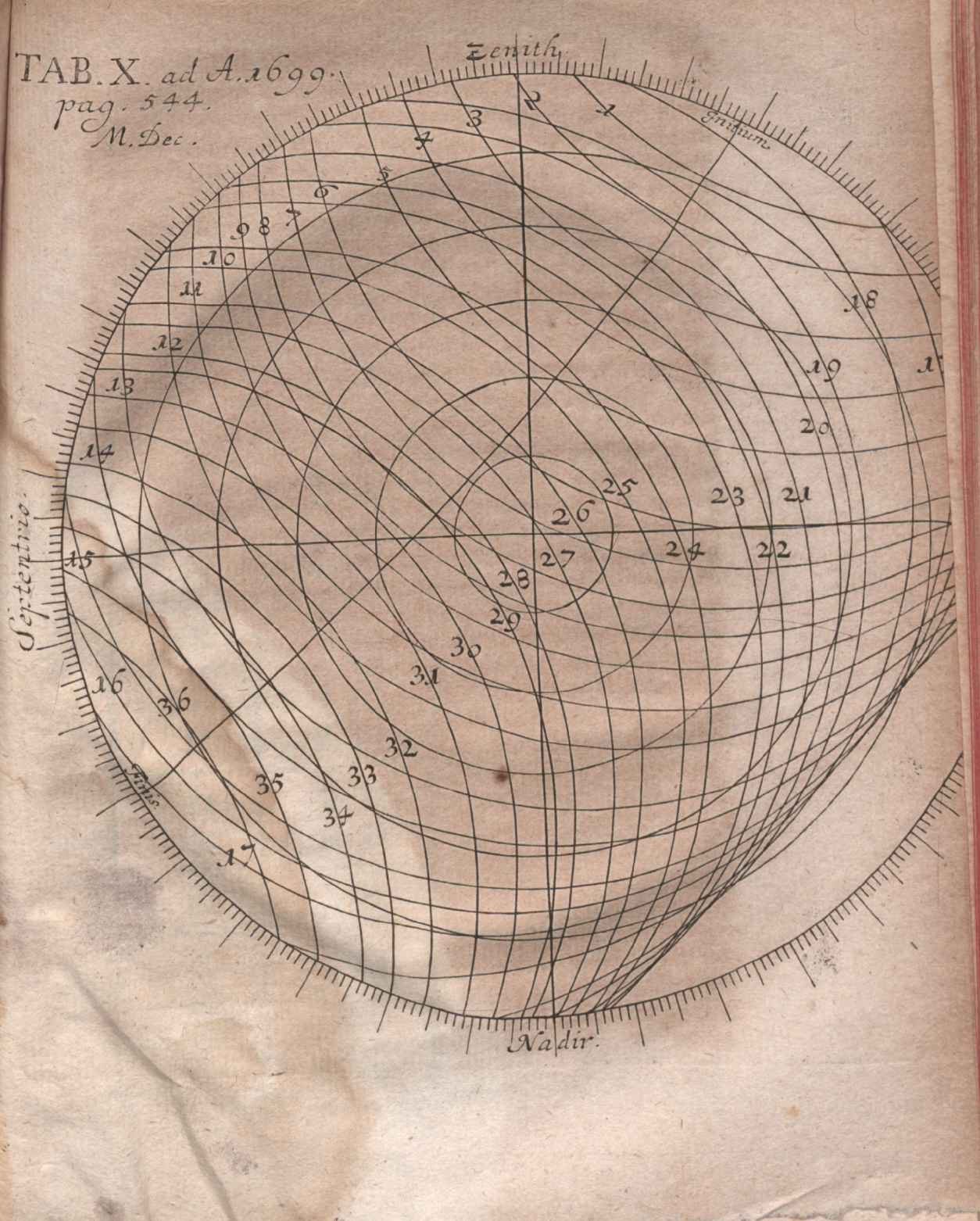 Illustration